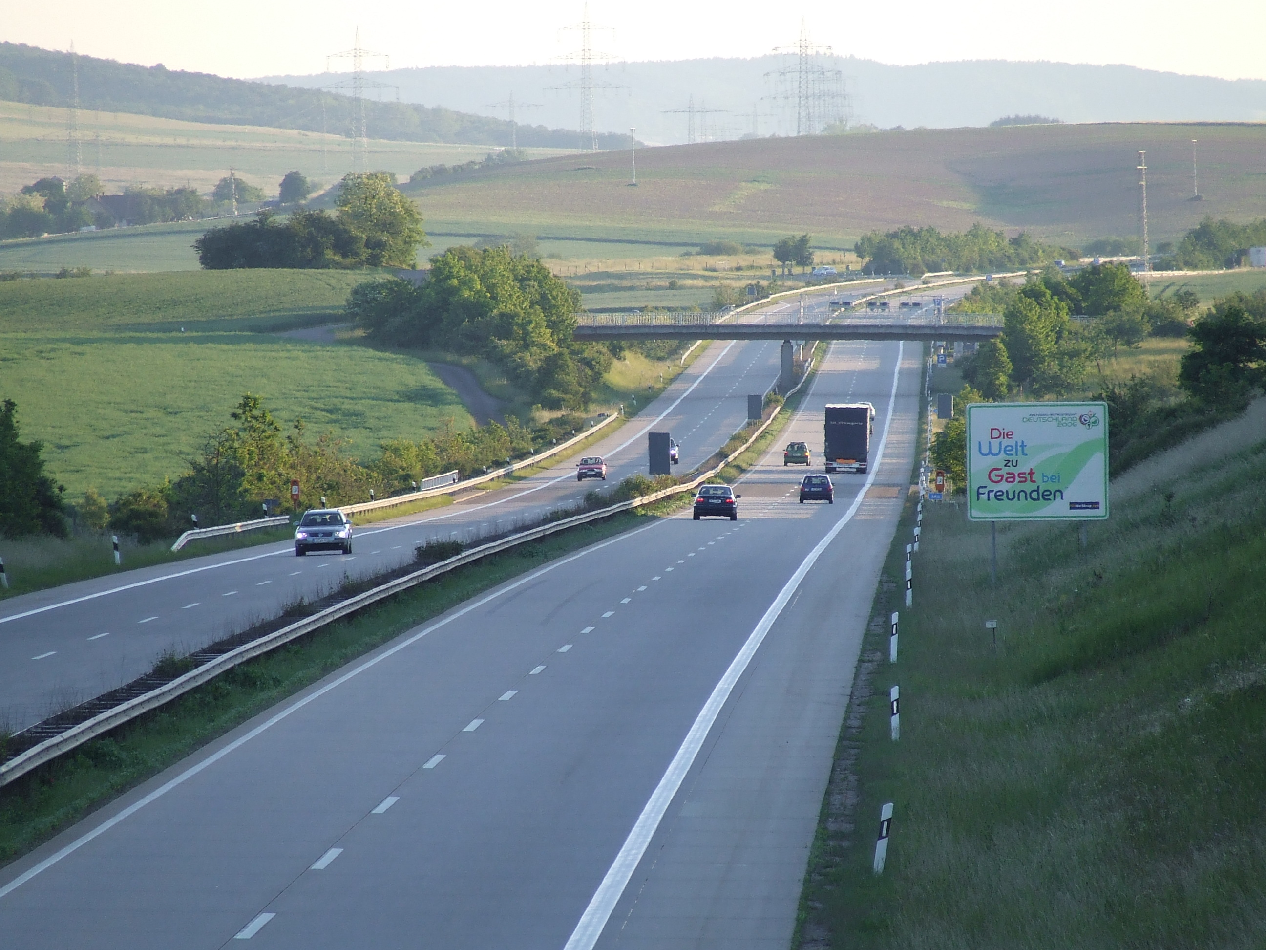 Bundesautobahn 63, Streckenabschnitt bei Göllheim, Autobahnkilometer 48,5